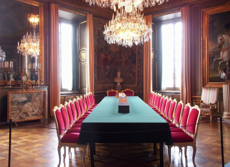 Konseljsalen